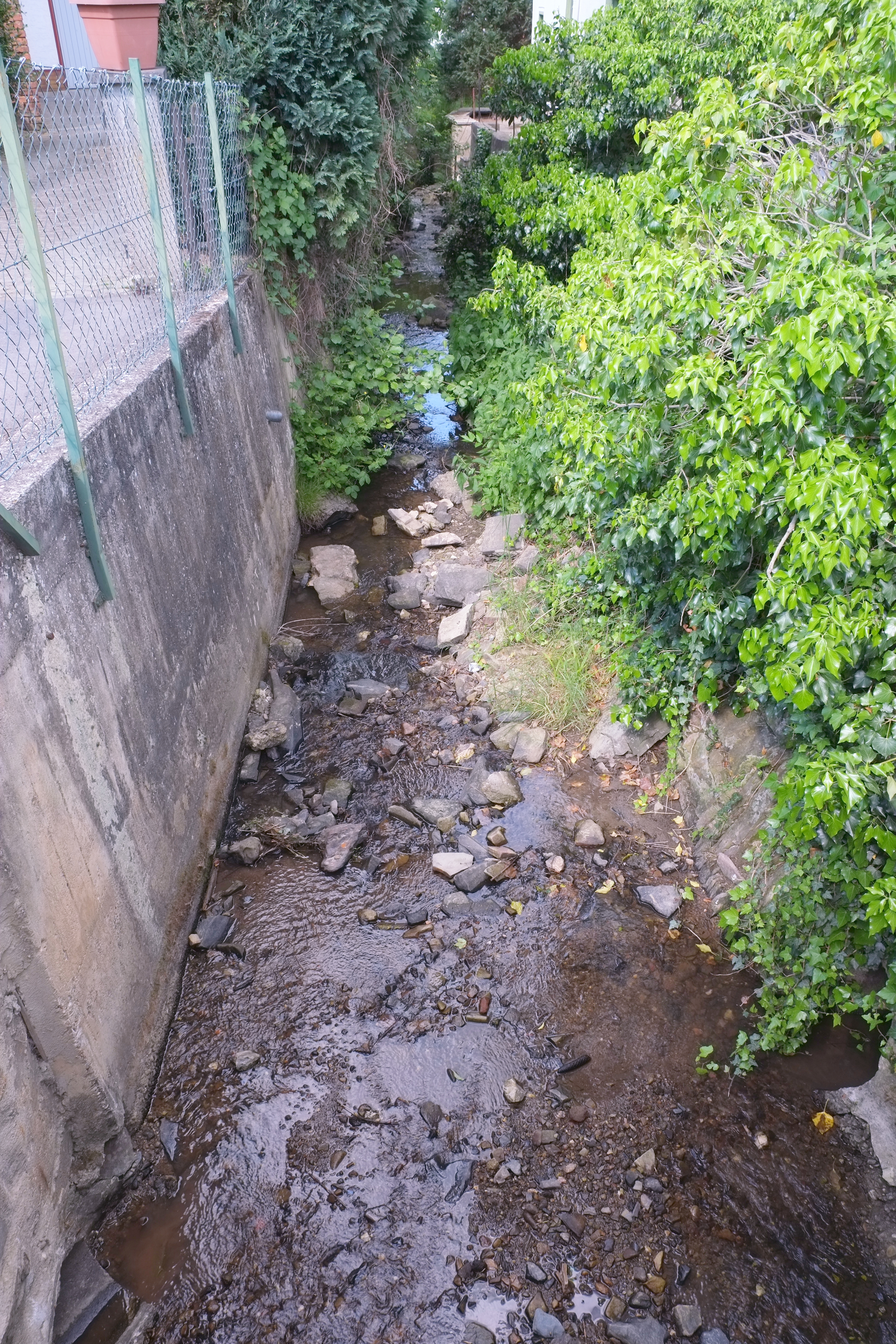 Bachemer Bach im Stadtteil Bachem von Bad Neuenahr-Ahrweiler im Landkreis Ahrweiler (Rheinland-Pfalz, Deutschland)